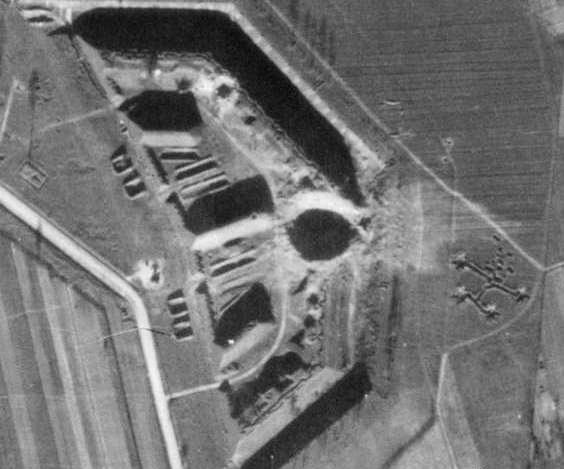 Аэроснимок форта №3 1944 года.